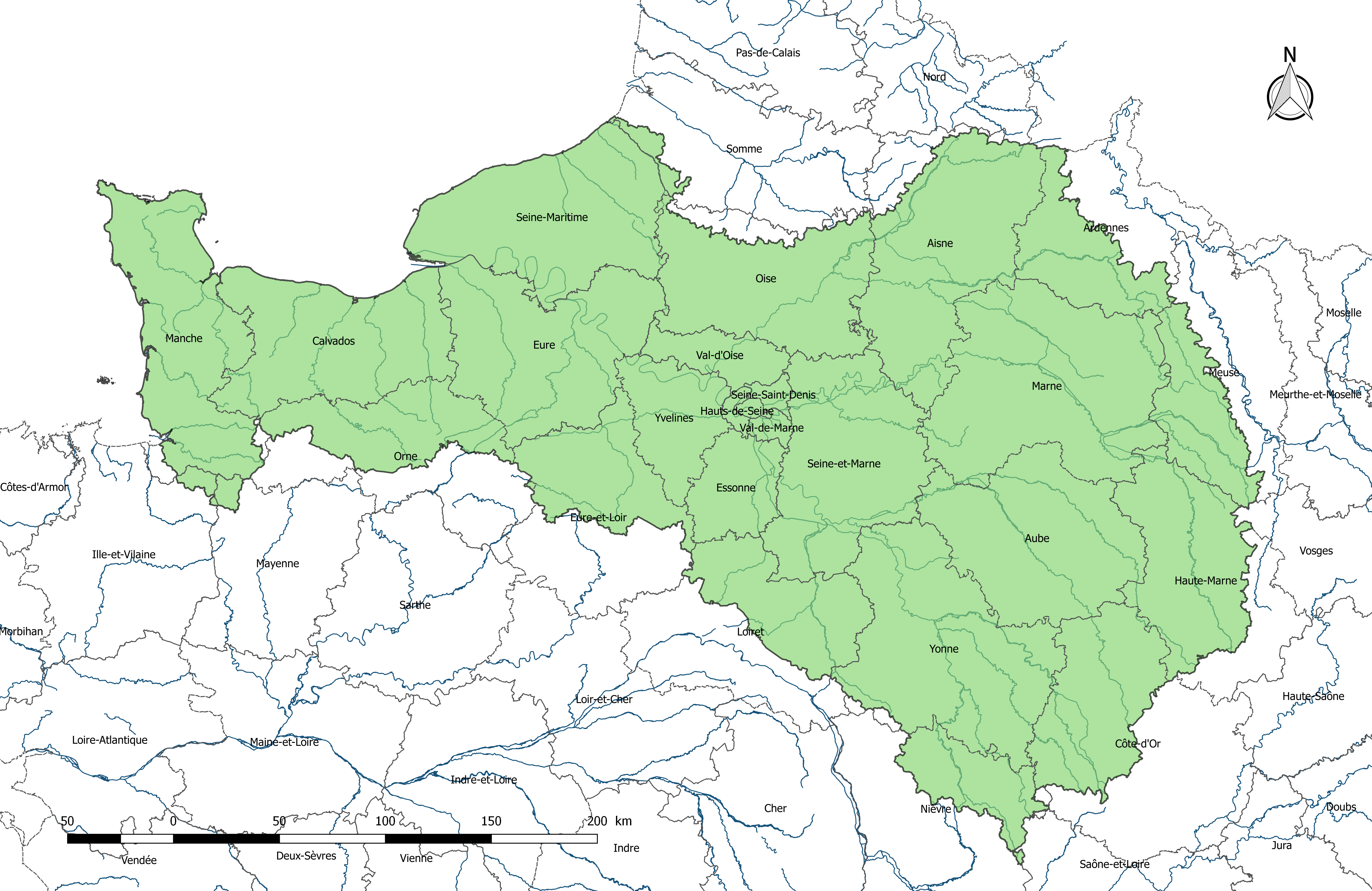 Carte de la circonscription de bassin Seine-Normandie en France, avec les départements qui la composent.